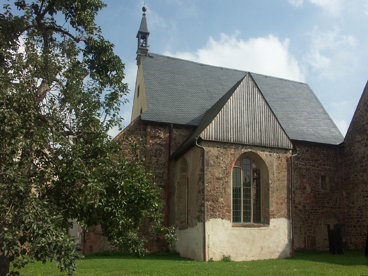 Kloster Buch: Außenansicht der Gutskirche